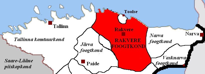 Rakvere foogtkonna asend Põhja-Eestis